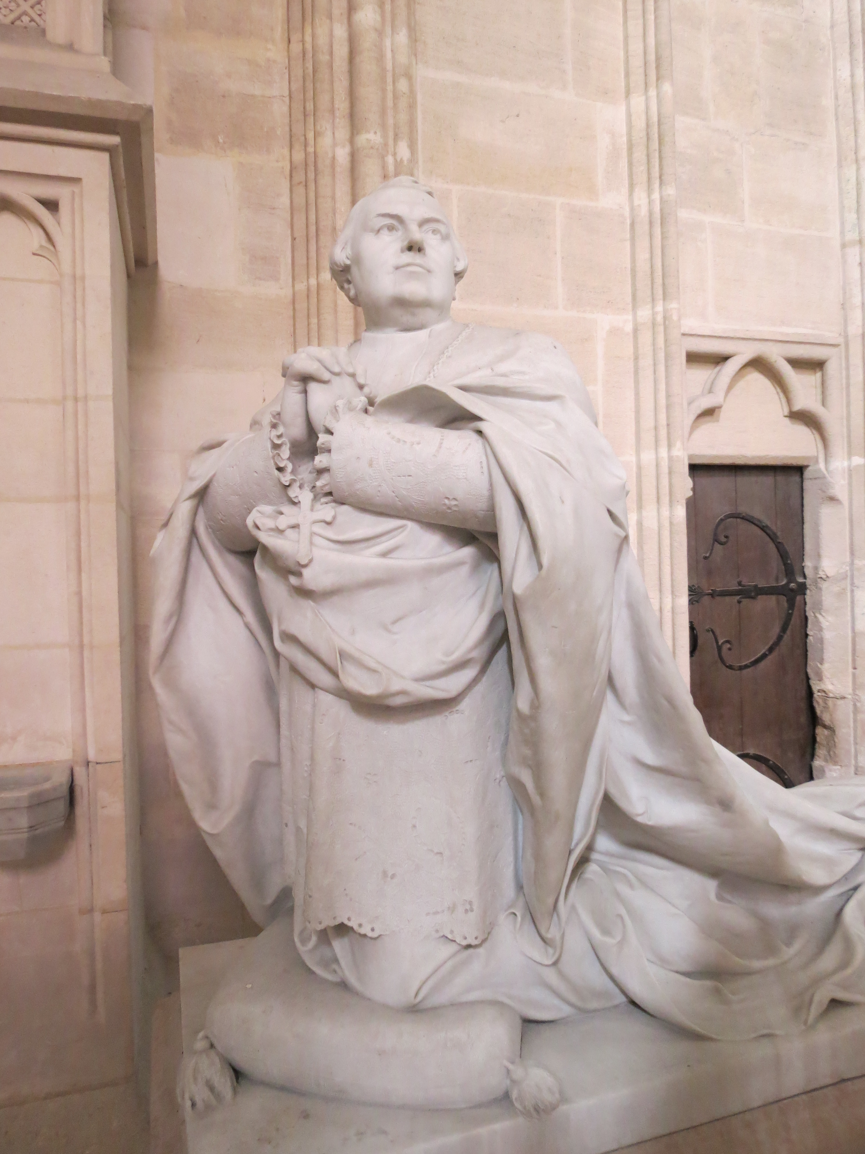 Détail de l'orant de François-Marie Trégaro (1824-1897), évêque de Séez (1881-1897), du sculpteur Étienne Leroux en 1899..